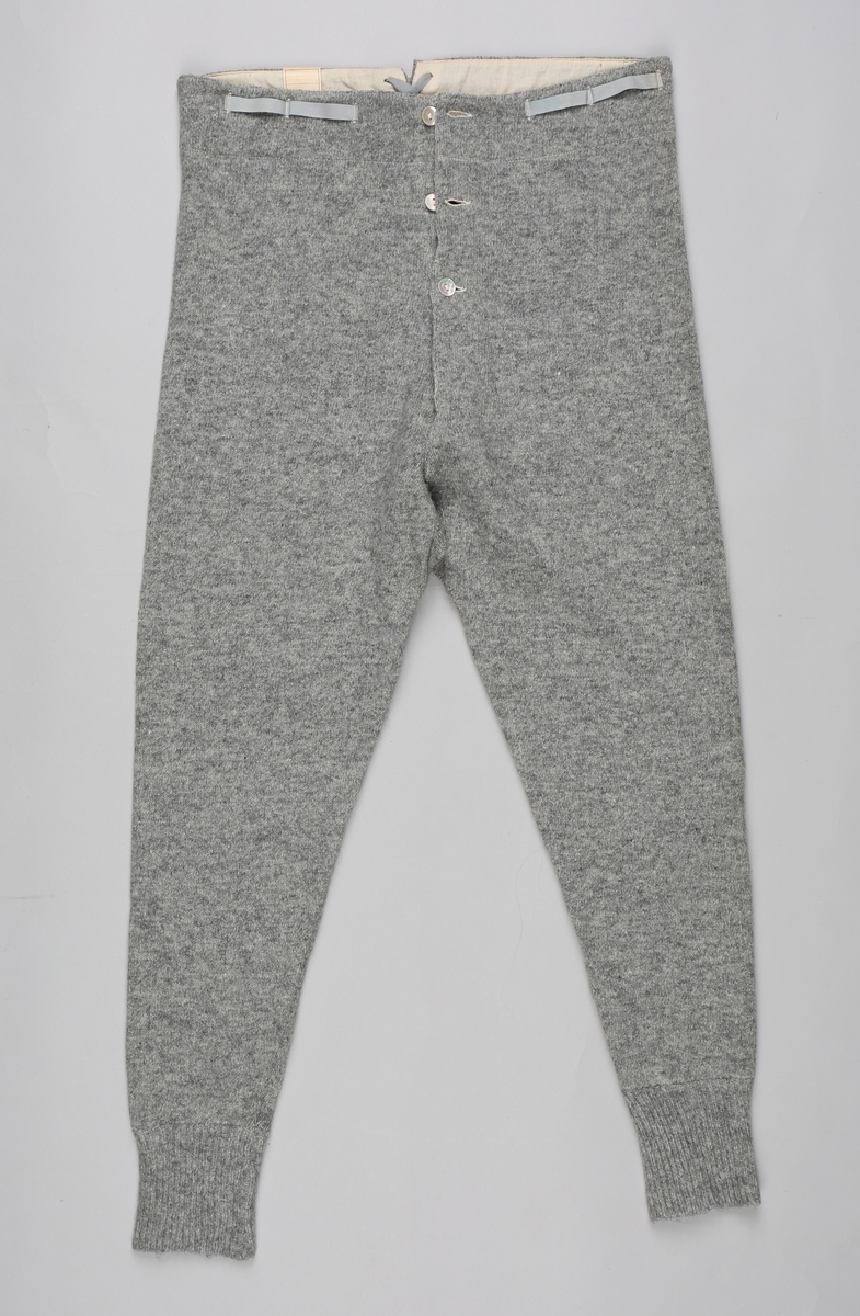 Lang underbukse i merket Krone, produsert ved Salhus Tricotagefabrik utenfor Bergen ca. 1940. (NTMT.00047, Norsk Trikotasjemuseum)